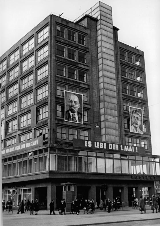 Berlin, Alexanderplatz, HO-Kaufhaus Zentralbild - Weiss 29.4.1953 Berlin schmückt sich für den Internationalen Kampf- und Feiertag der Werktätigen 1953 - Das Berolina-Hochhaus am Alexanderplatz.